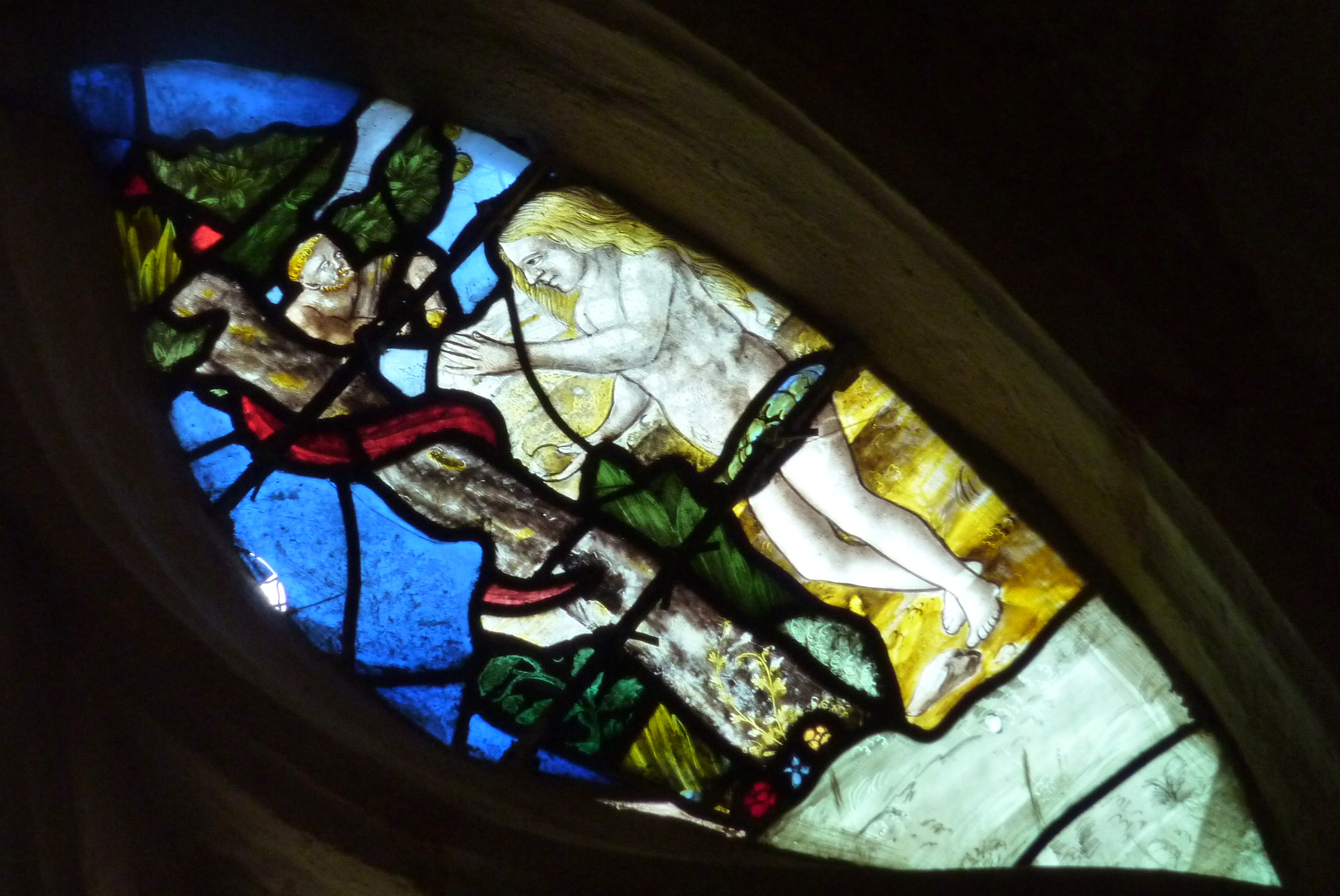 Bleiglasfenster aus dem 16. Jahrhundert in der katholischen Kirche Saint-Martin in Survilliers, einer Gemeinde im Canton de Luzarches (Île de France), Darstellung: Eva und die Schlange